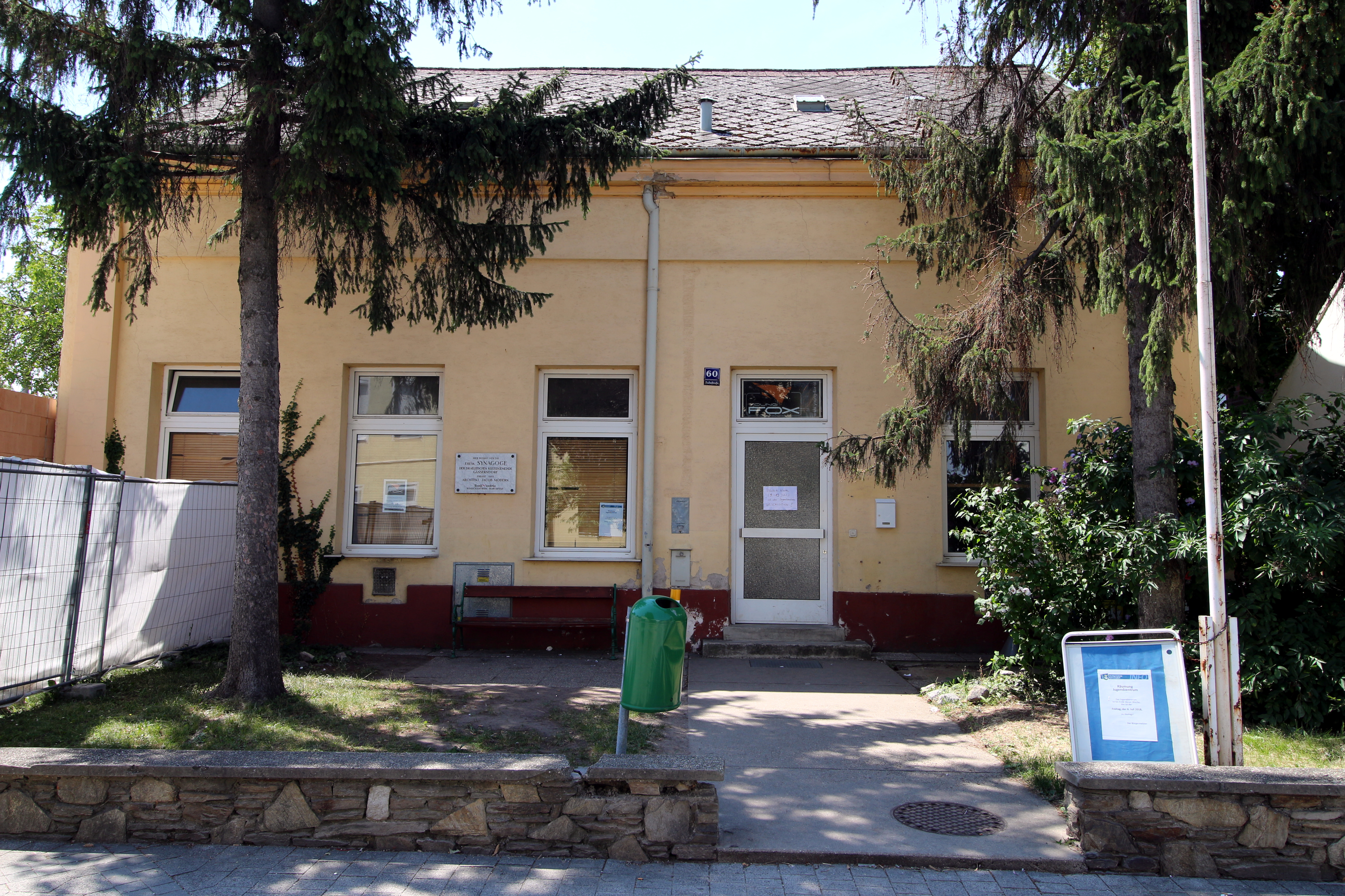 Ehemalige Synagoge in Gänserndorf, Niederösterreich. Zum Zeitpunkt der Aufnahme vom BDA temporär unter Schutz gestellt.